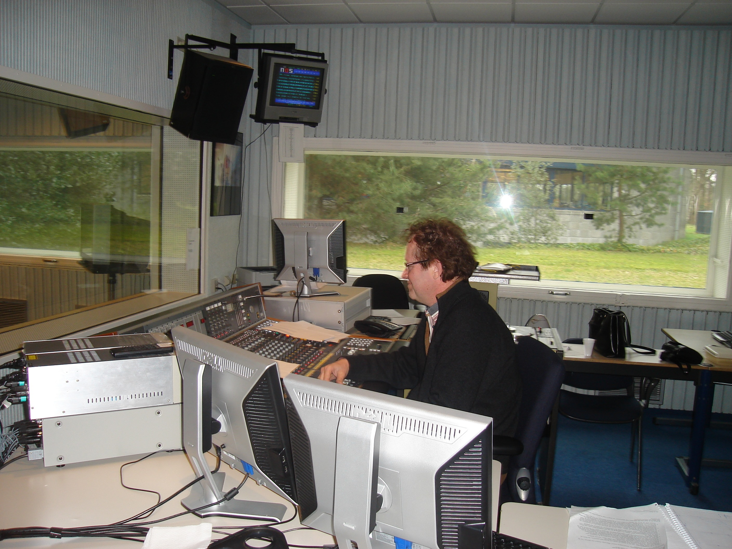 Radio Nederland Wereldomroep Studio أستديو إذاعة هولندا العالمية